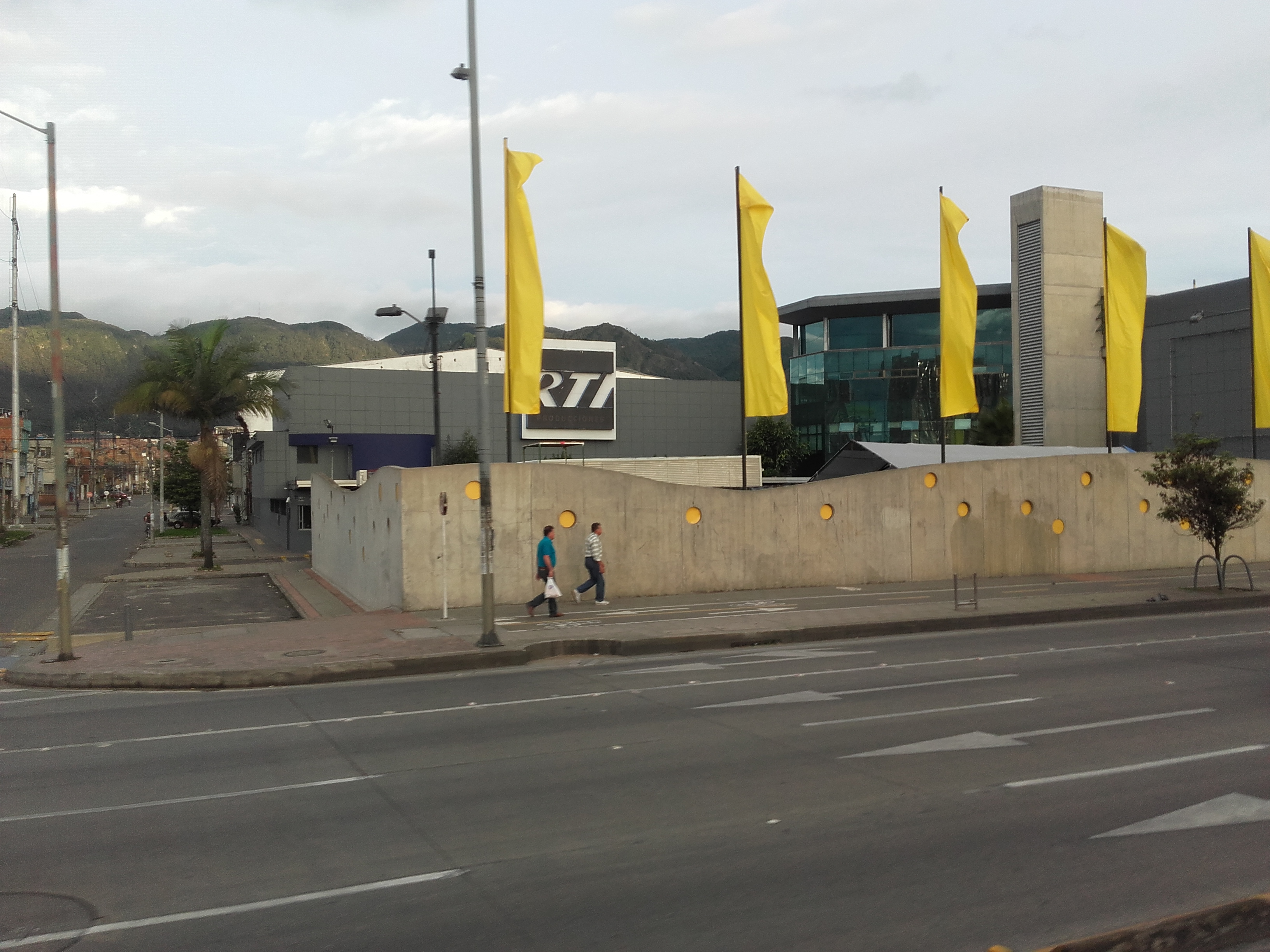 fkffkfffjfjjffjjr